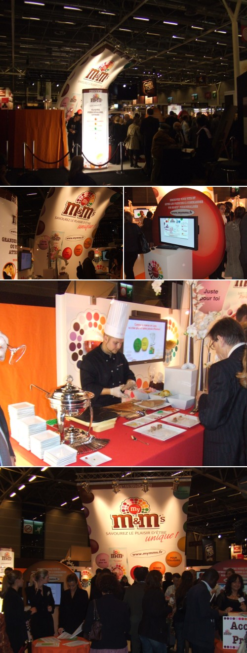 MyMMs au salon du chocolat